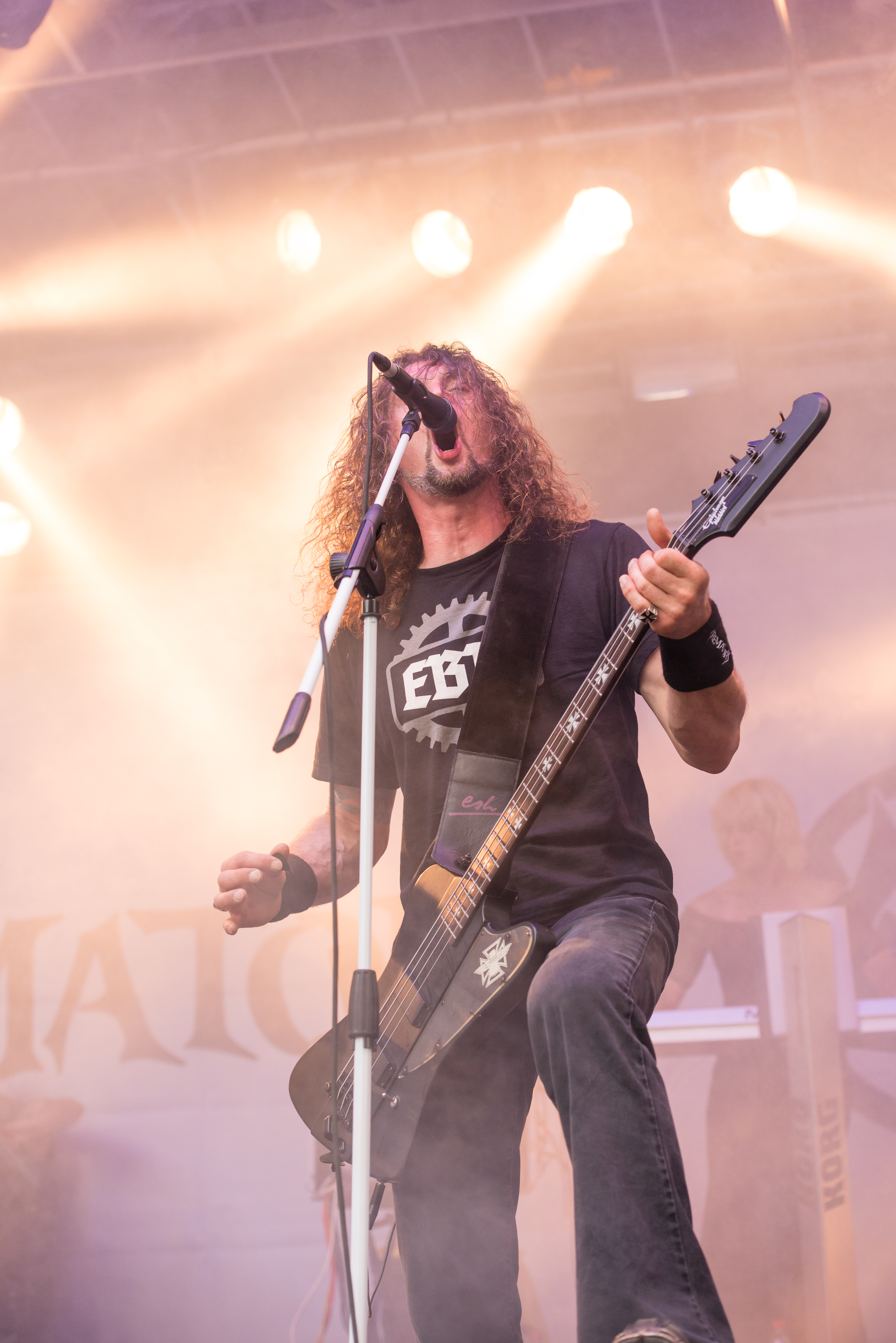 'Castle Rock 2014 - Mülheim an der Ruhr': 'Crematory'